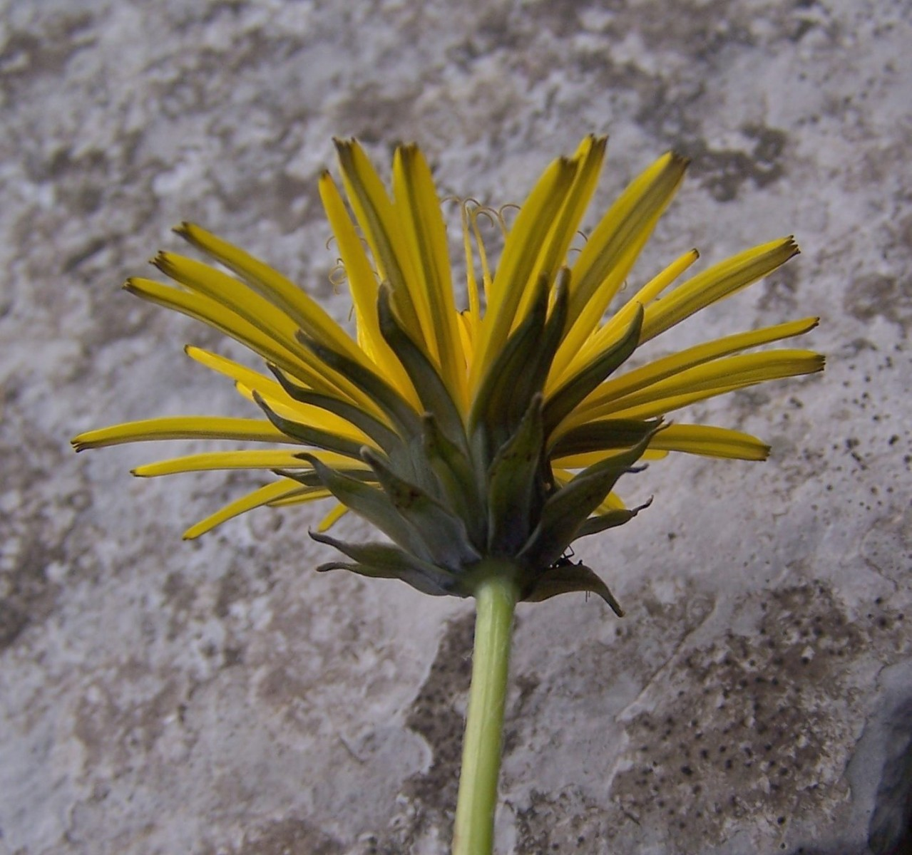 Taraxacum alpinum (pl. mniszek alpejski), habitat: West Tatra Mountains, Kobylarzowy Żleb